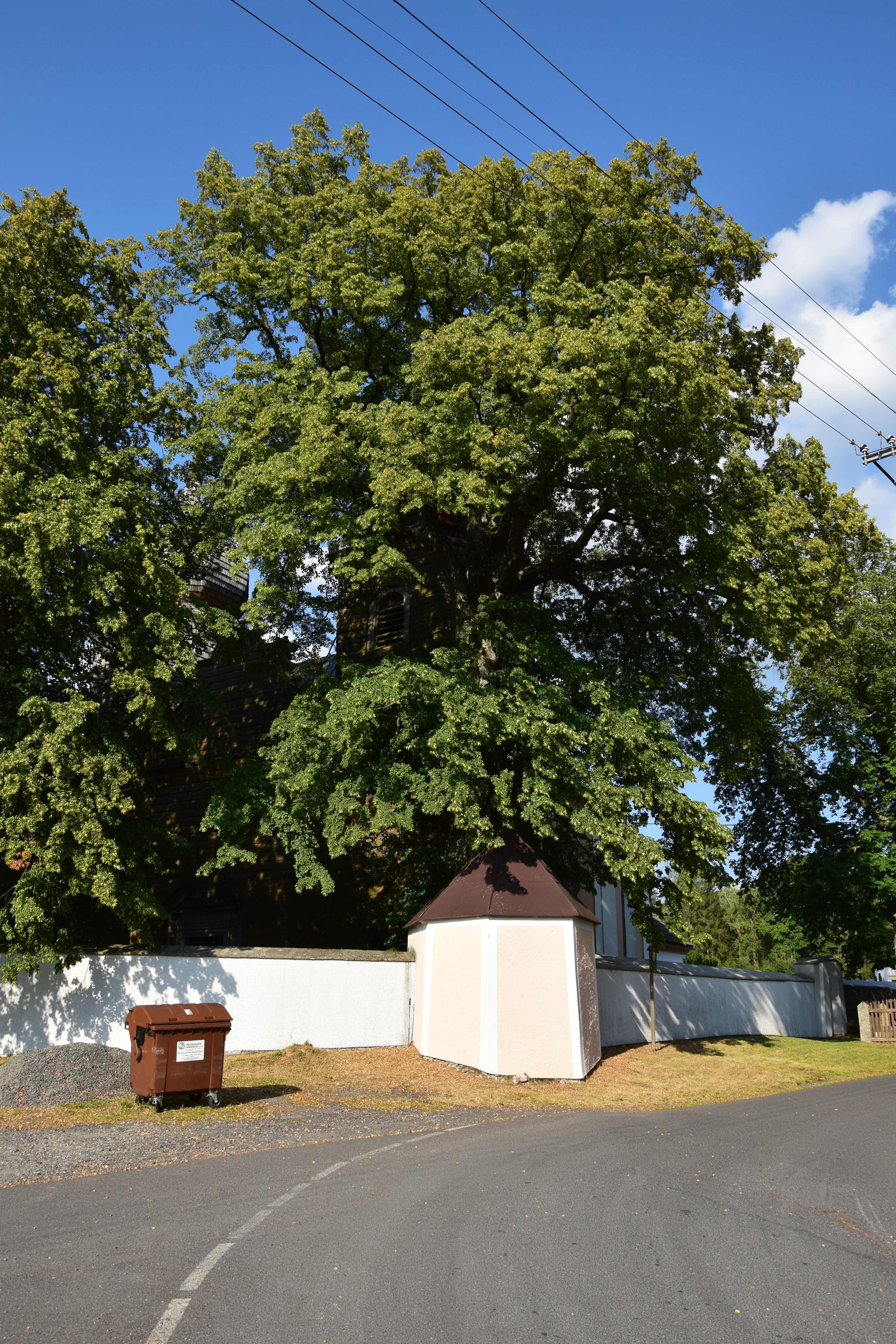 Javorná – památný strom lípa srdčitá v Javorné